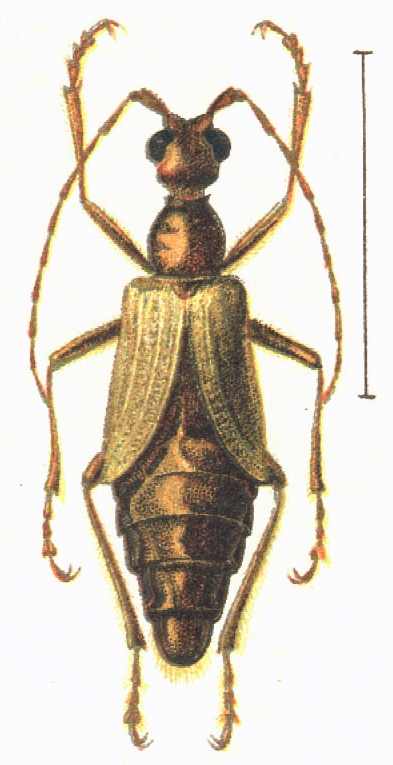 Vesperus luridus (Rossi) female